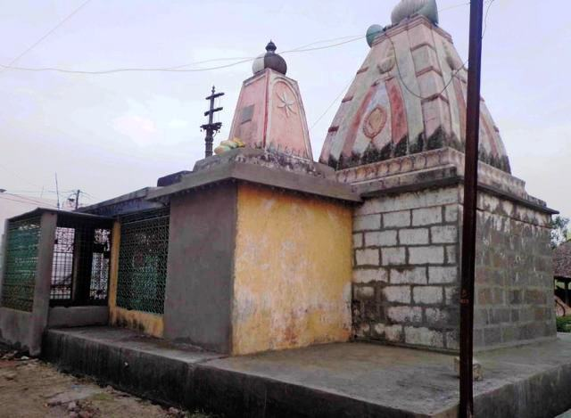 పడమర బజారులో ఉన్న పాత శివాలయం.